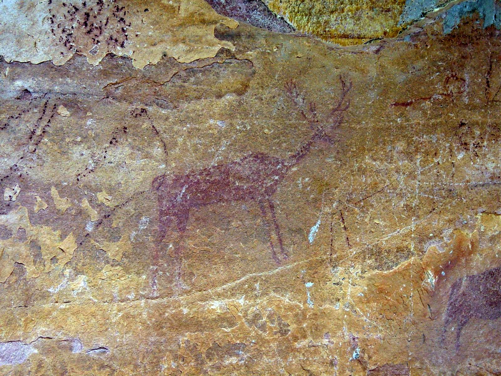 Ciervo pintado en la Peña el Escrito. Villar del Humo (Cuenca)